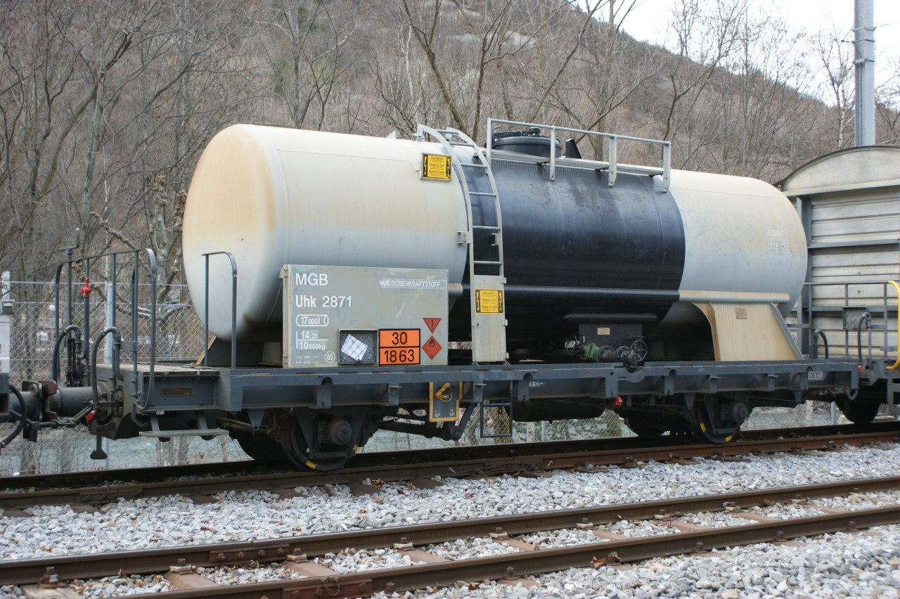 Kesselwagen MGB Uhk 2871 (1948) mit Kessel von Uhk 4893 (1971) im Vispsand